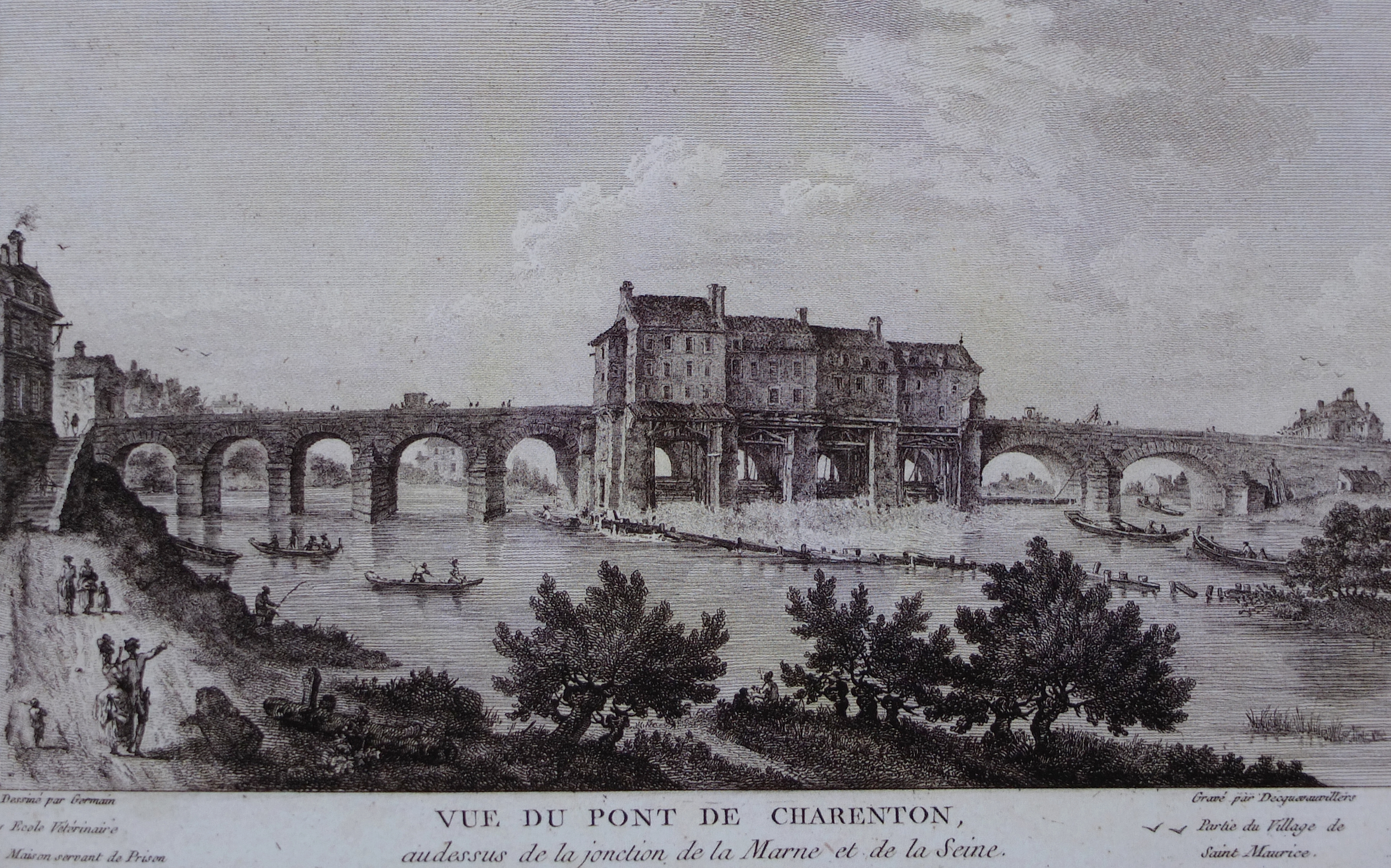 Gravure vers 1750, le pont de Charenton (Val-de-Marne, France). Dessin de Germain, graveur Decquevauvillers. Archives de Charenton.